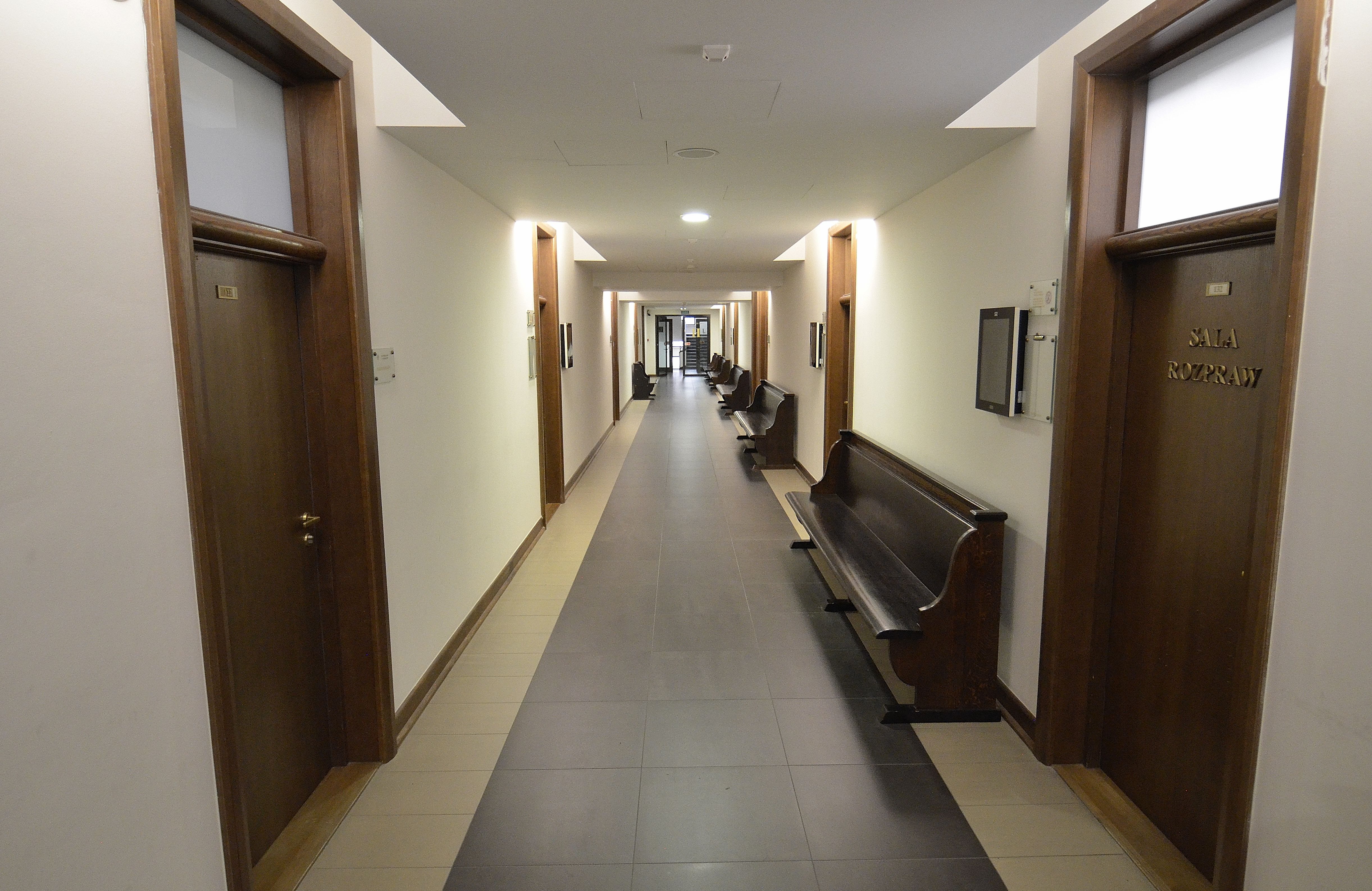 Korytarz w gmachu Sądu Okręgowego w Warszawie (tzw. Sądy na Lesznie)